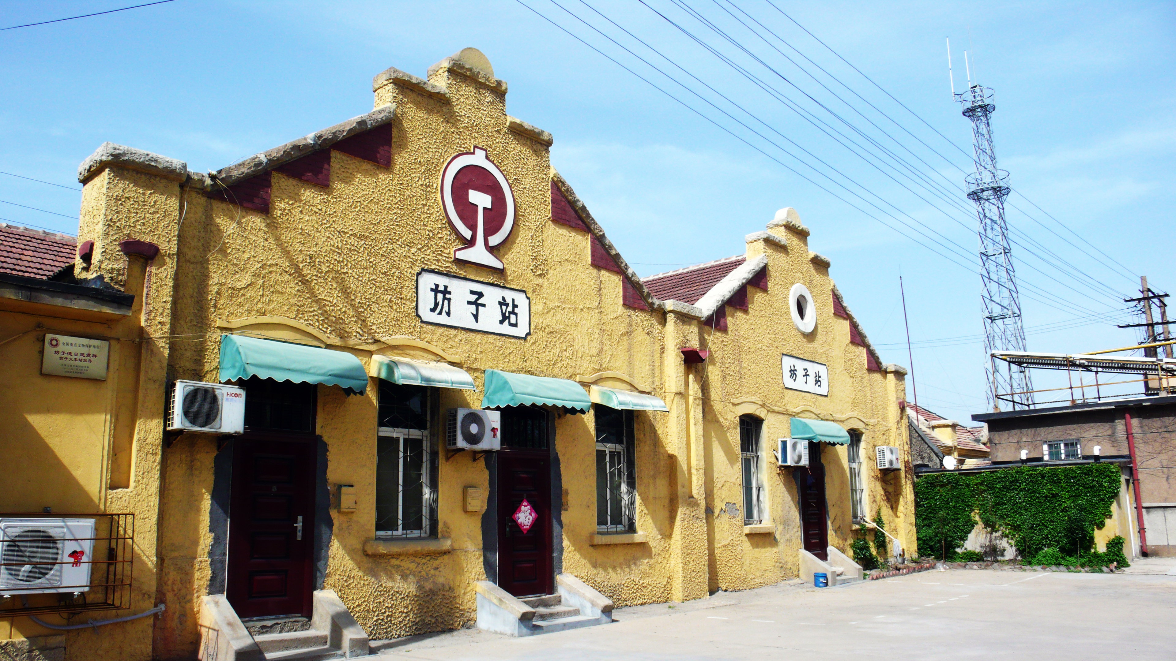 中文（中国大陆）: 坊子火车站。